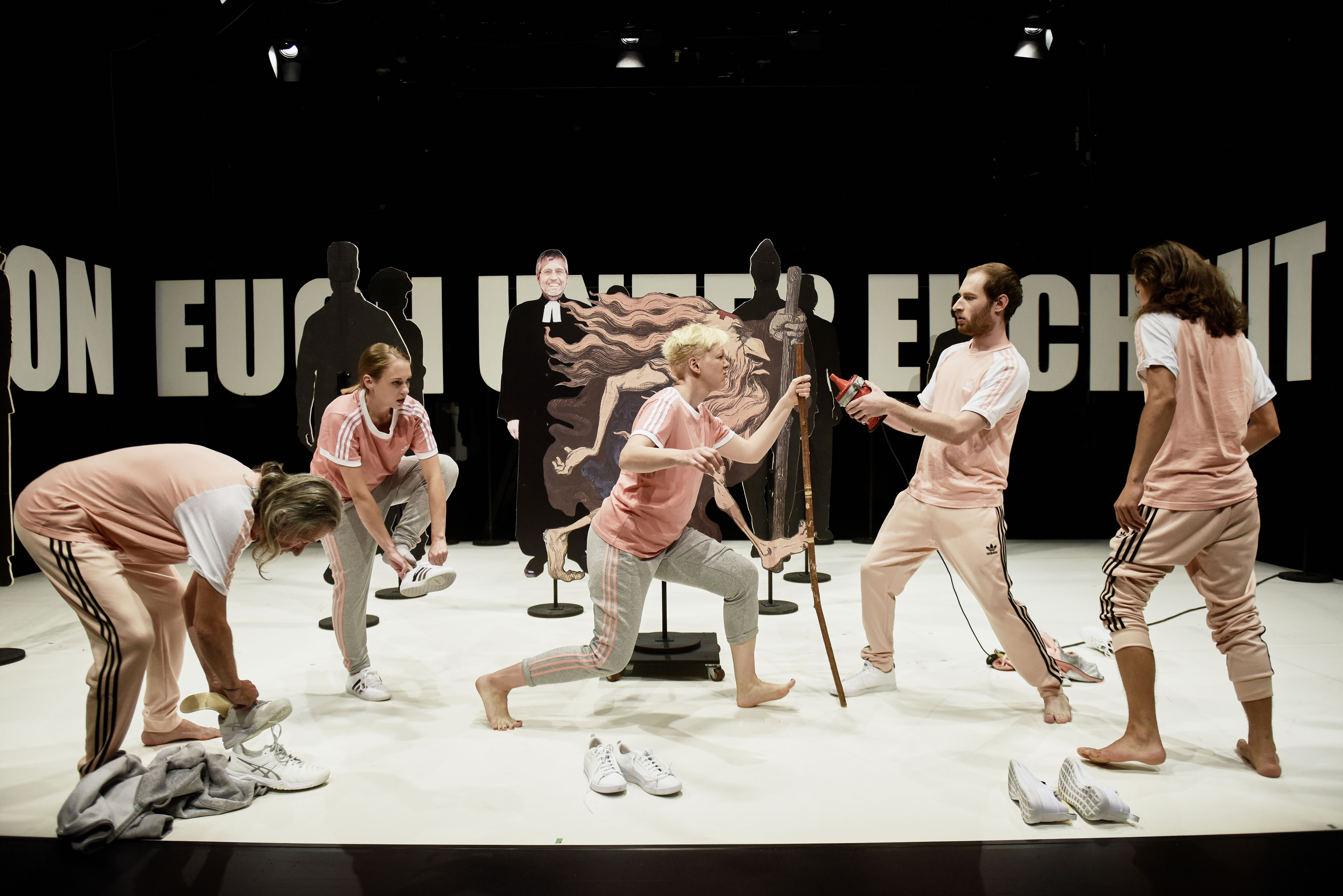 Das Foto wurde auf den Proben für die Inszenierung "Andorra", des Jungen LTT in der Spielzeit 2018/2019 im Auftrag der Abteilung Öffentlichkeitsarbeit des Landestheaters Württemberg-Hohenzollern Tübingen Reutlingen (LTT) aufgenommen.